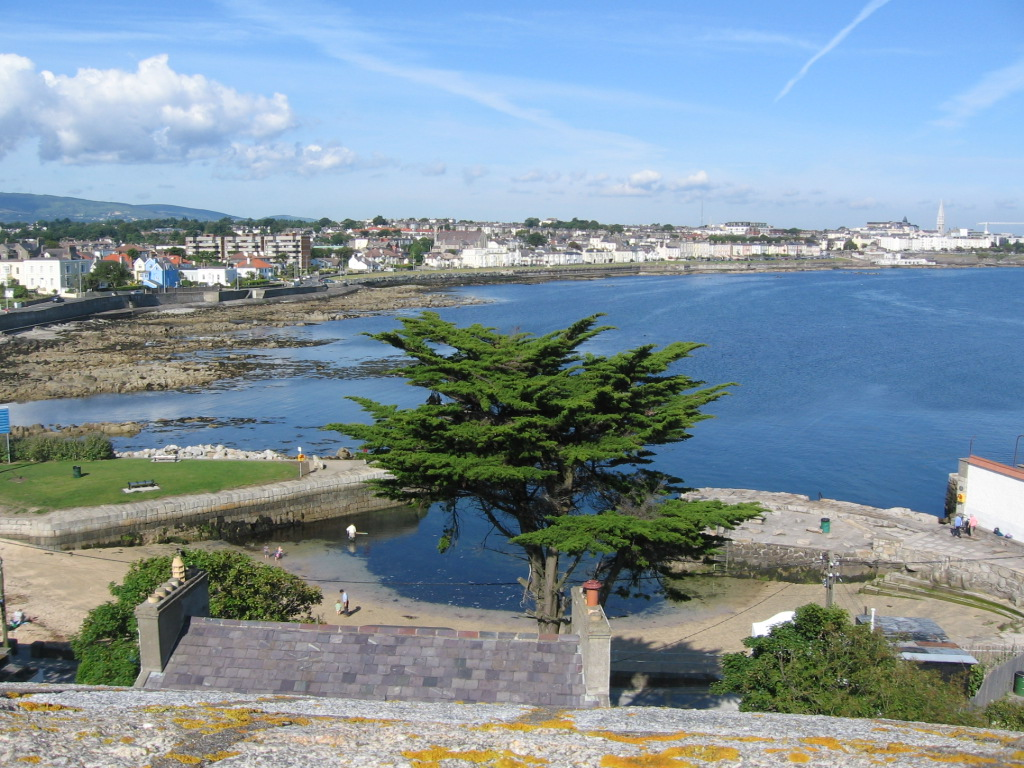 נוף ממגדל מרטלו